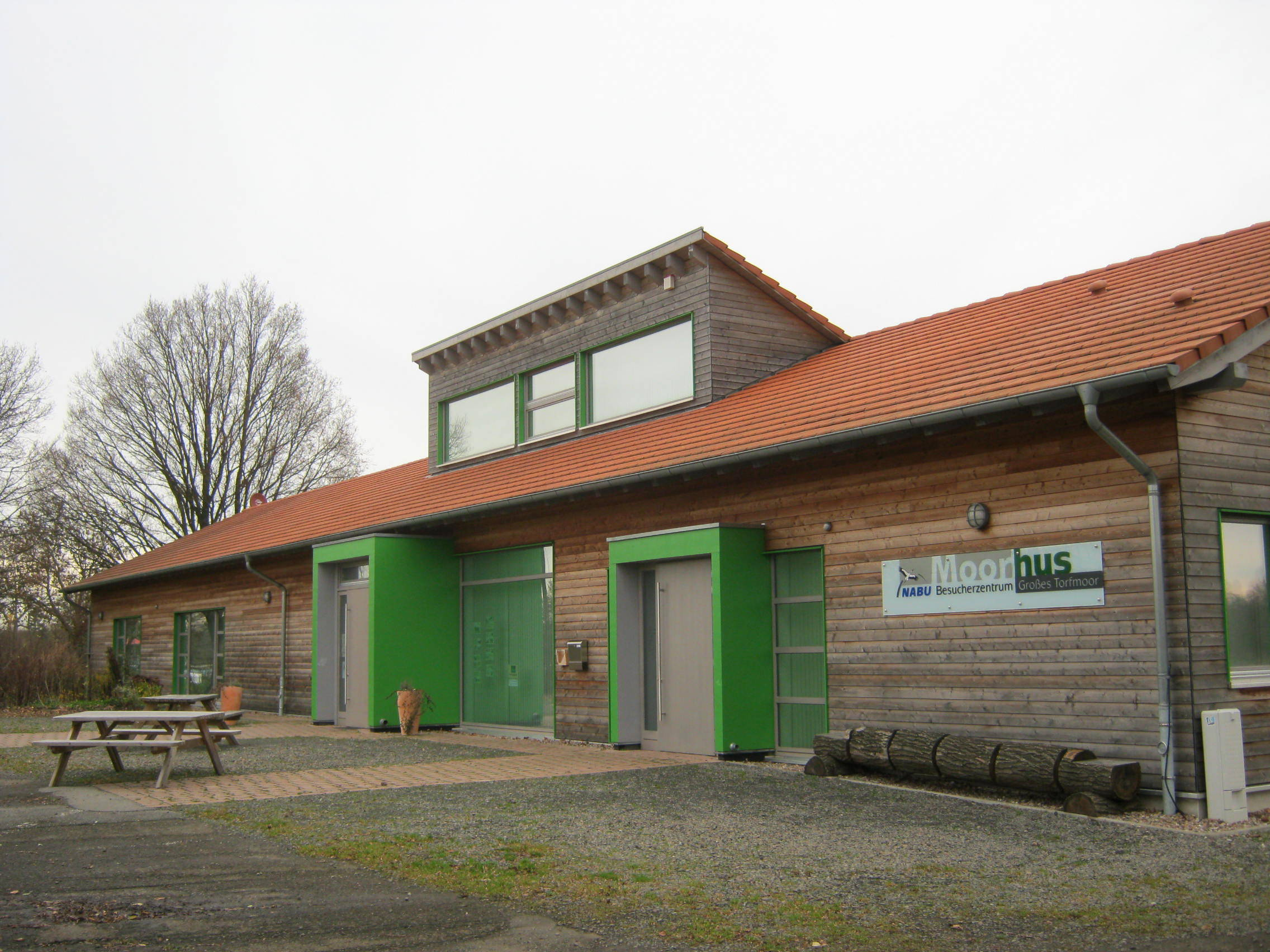 Das Naturschutzzentrum „Moorhus“ des NABU Kreisverbandes Minden-Lübbecke am Großen Torfmoor in Gehlenbeck, Lübbecke.